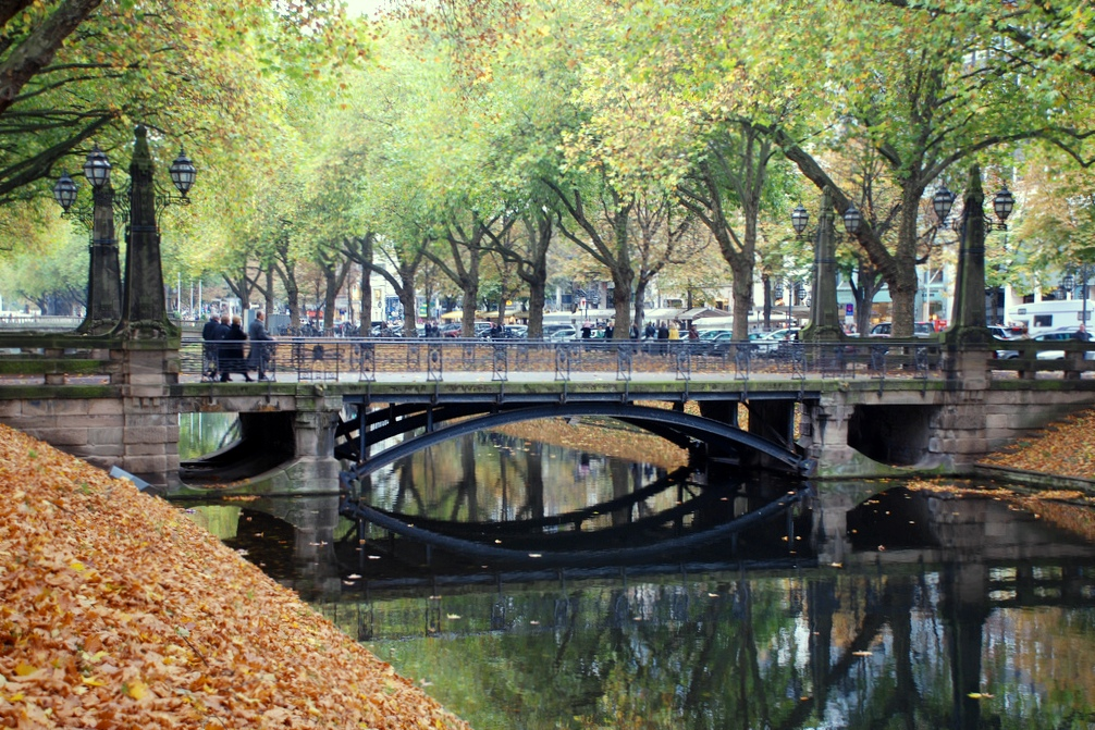 Girardetbrücke by the Kö, Düsseldorf